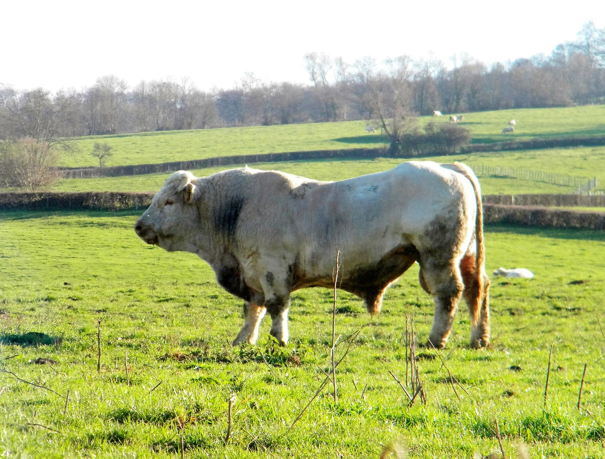 Taureau de race charolaise dans les prés proches du bourg de Sarry